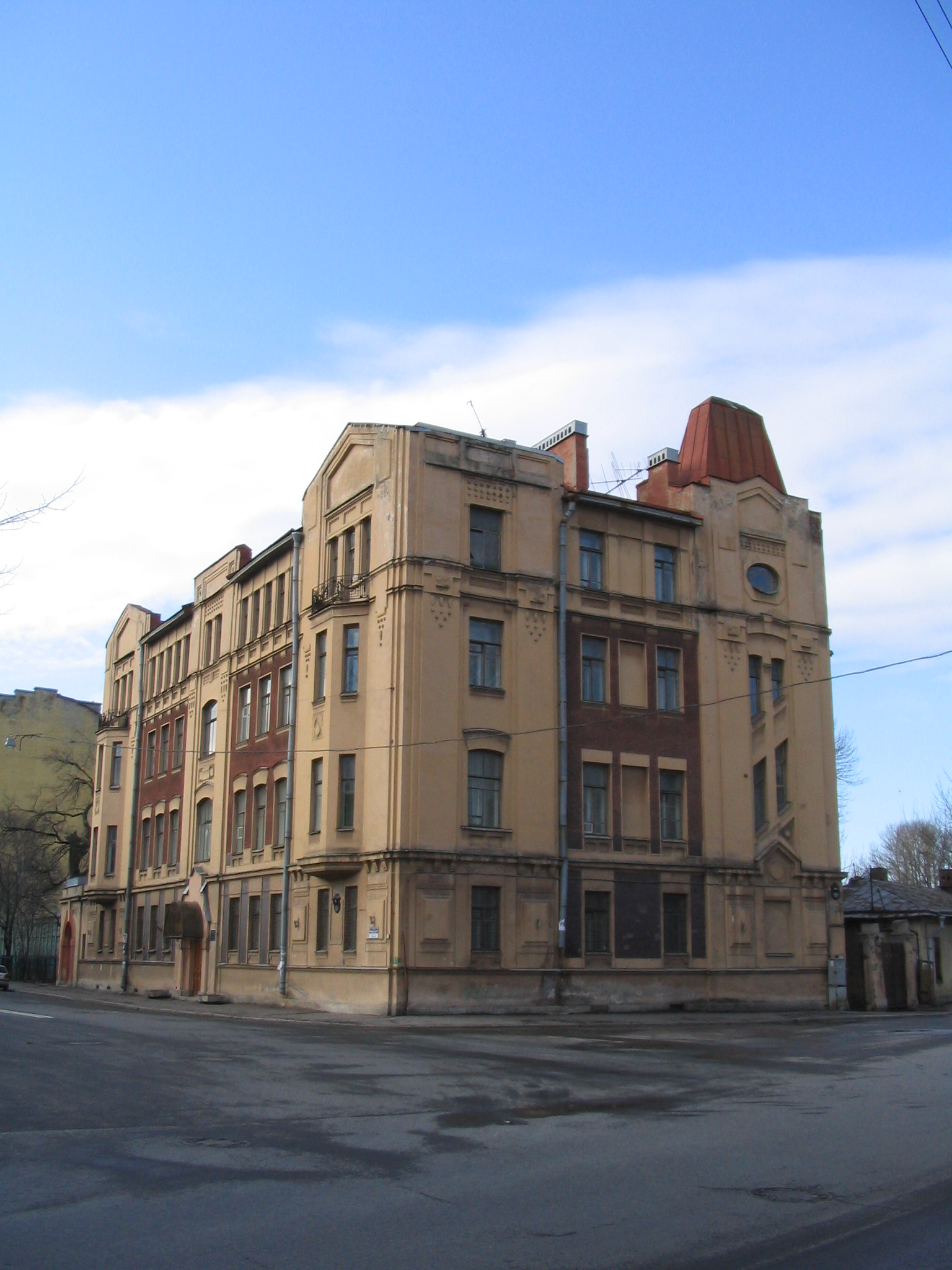 Здание ВНИИОкеангеология